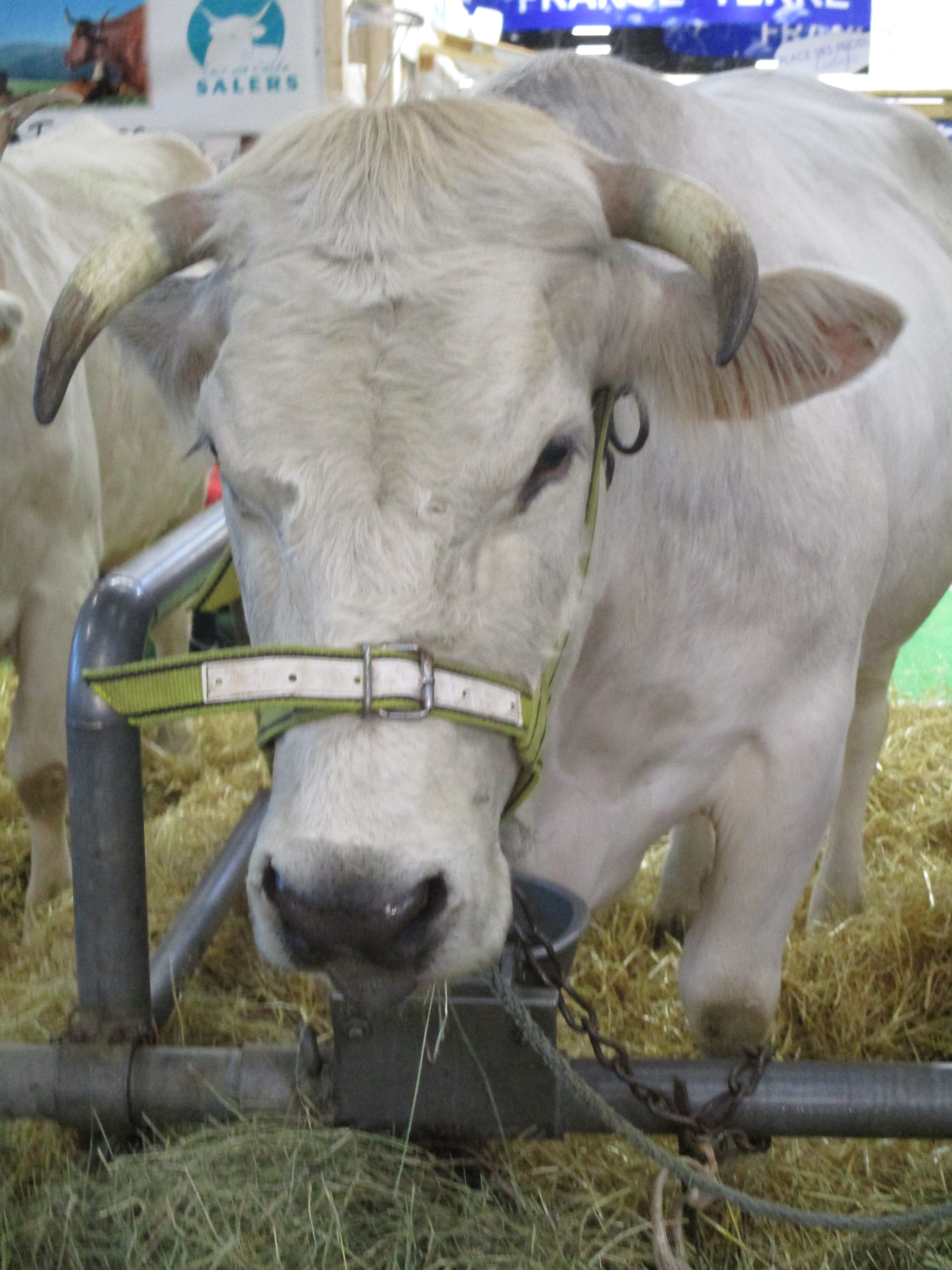 Vache mirandaise au Salon international de l'agriculture 2019.